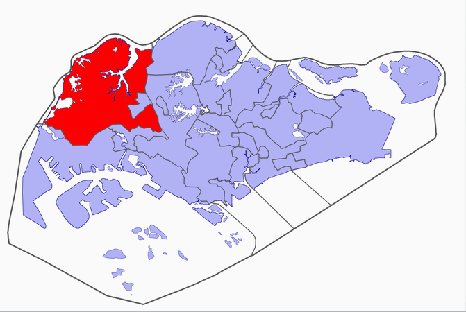 Singapore electoral map, 2006